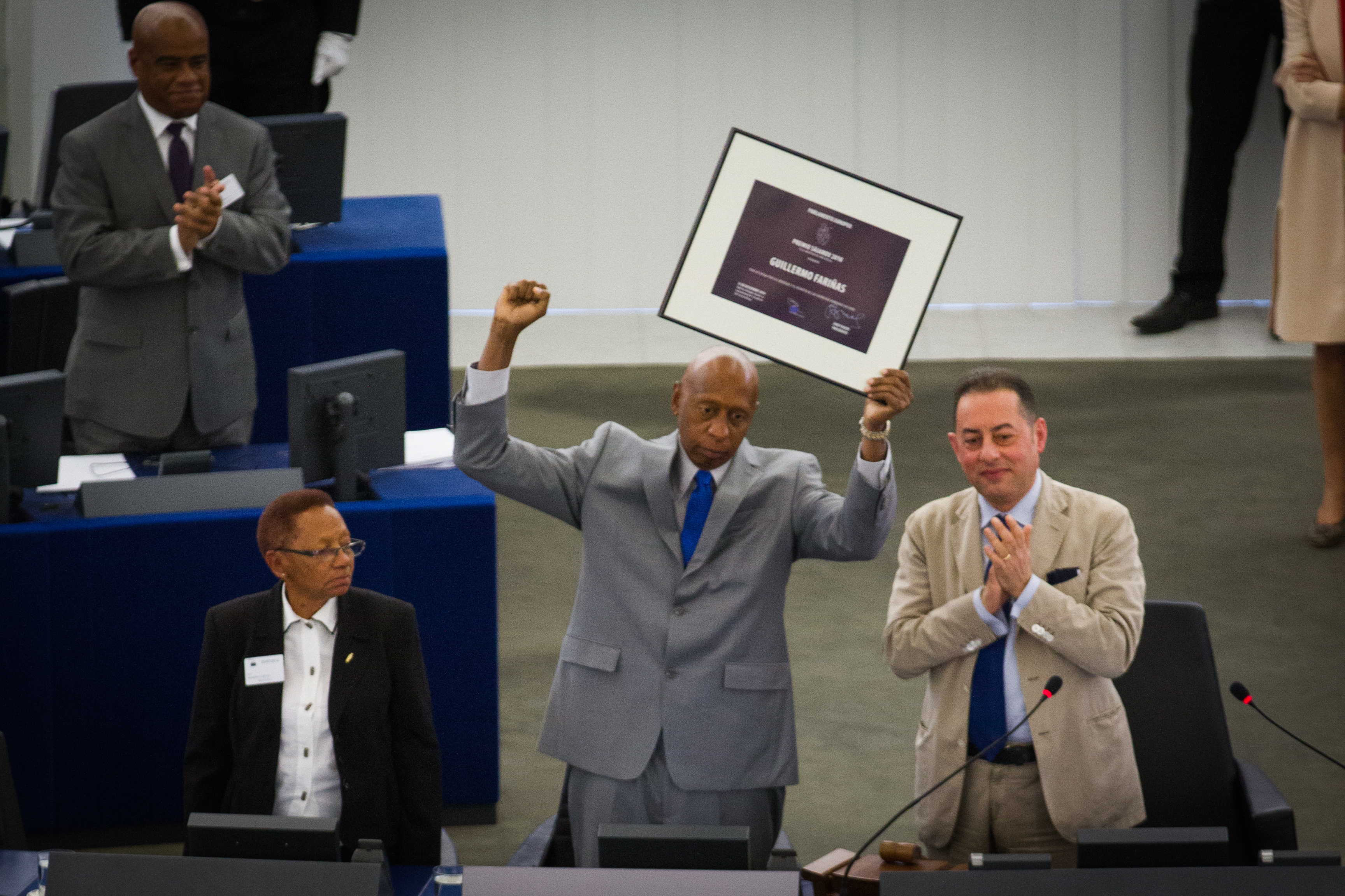 Remise du prix Sakharov 2010 à Guillermo Fariñas Strasbourg Parlement européen le 3 juillet 2013